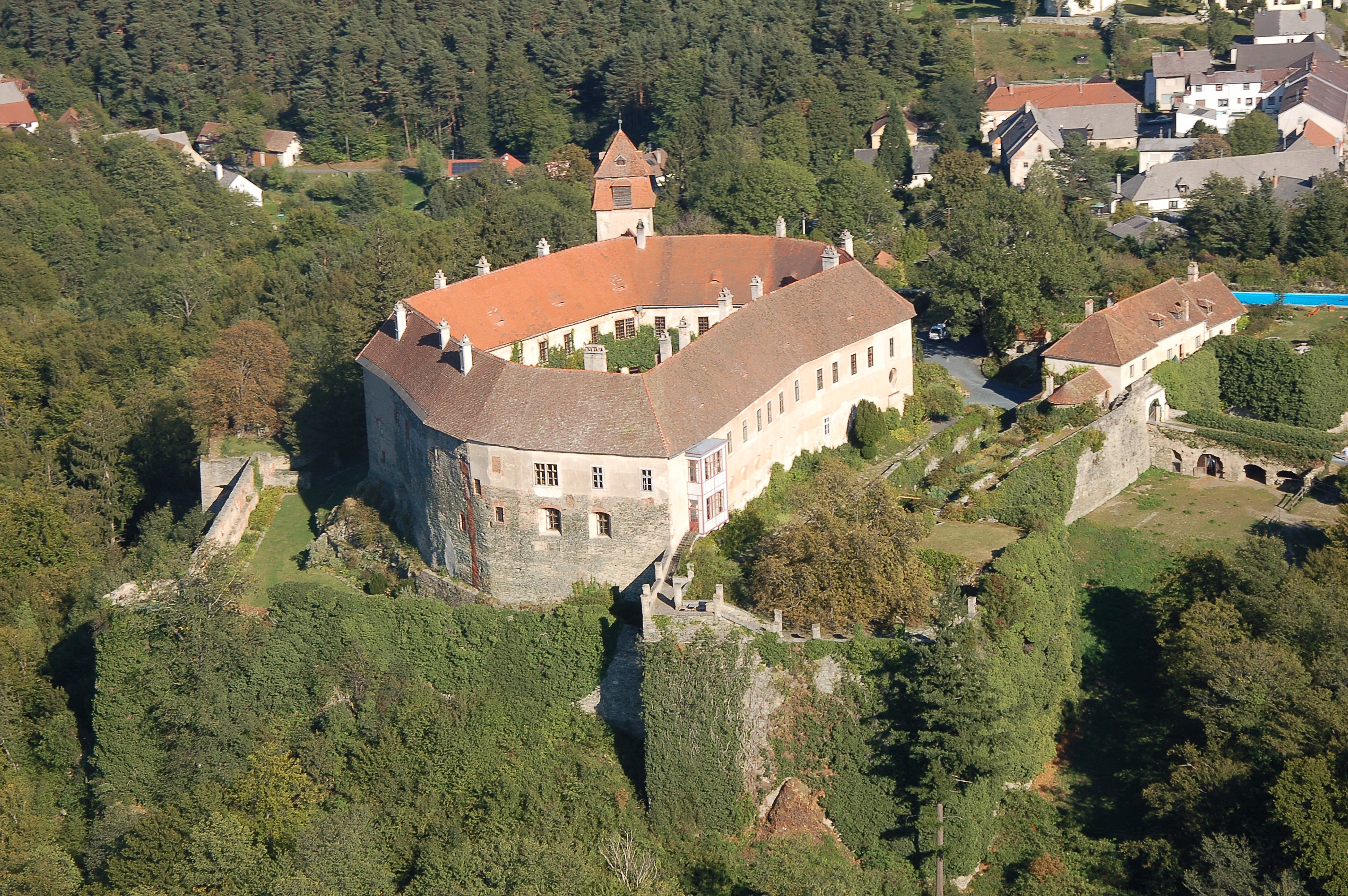 Burg Bernstein